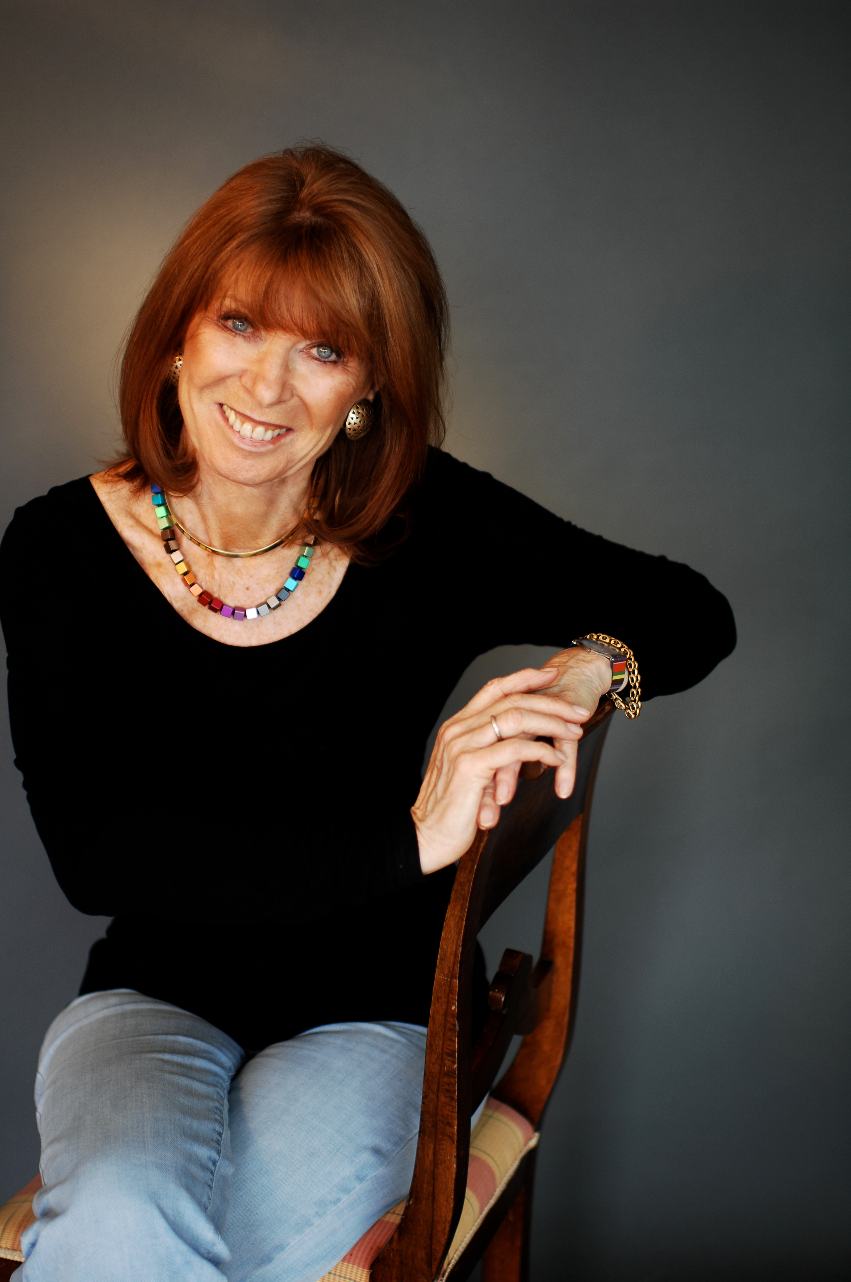 Bild von Margit Osterloh